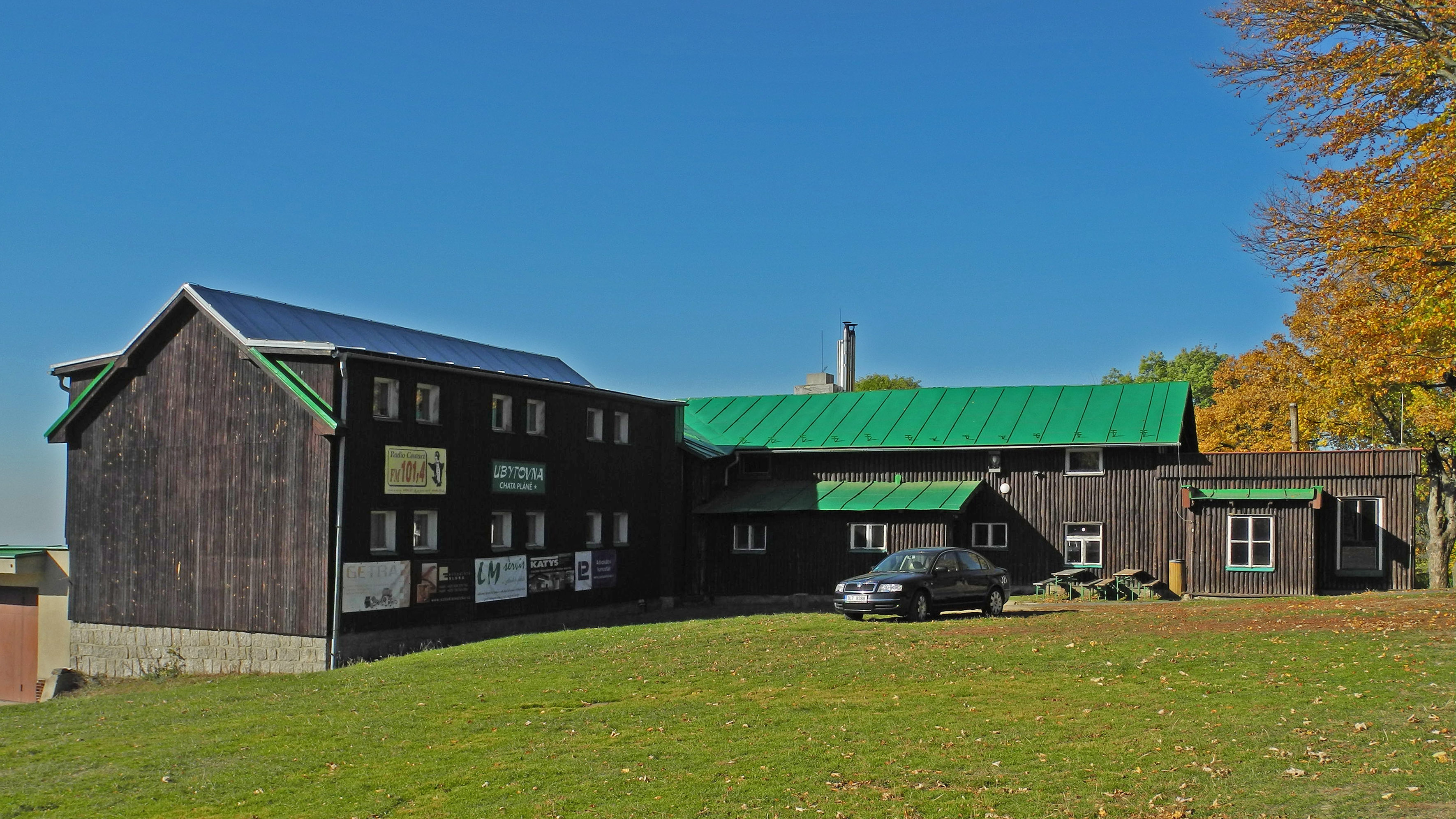 An der Kühnaibaude (Pláně pod Ještědem) am östlichen Jeschken-Kammweg